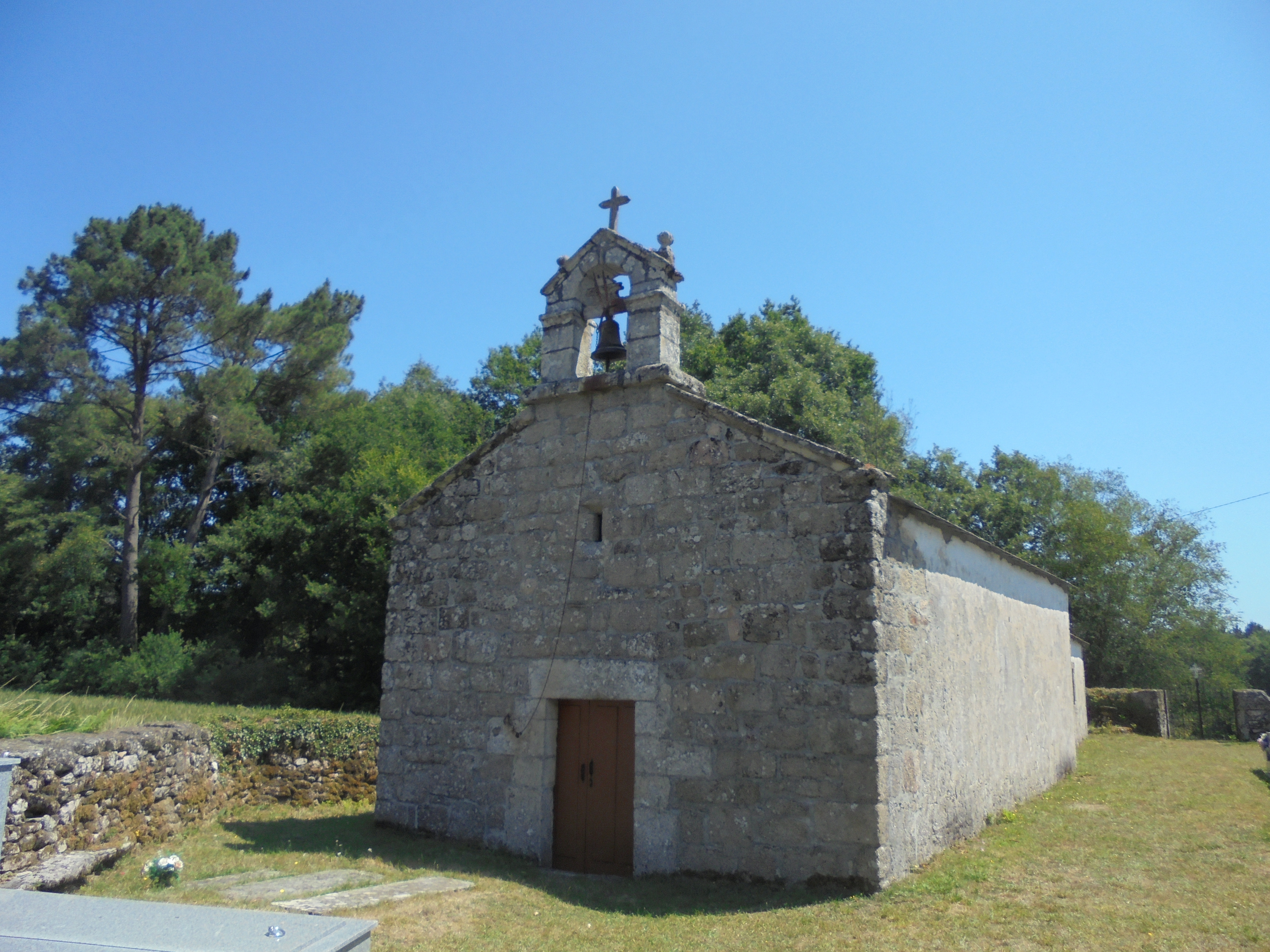 Igrexa parroquial de Bergazo ( O Corgo)